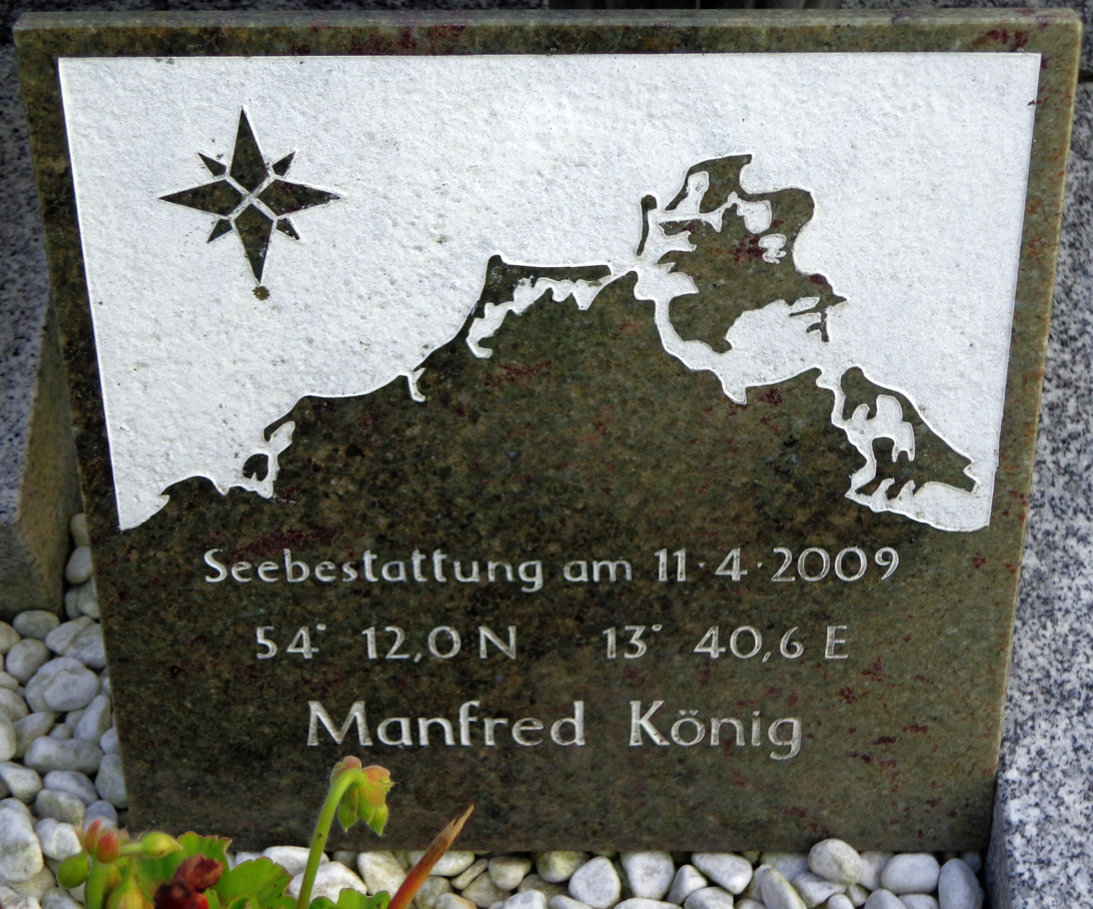 Hinweis auf Seebestattung auf dem Stadtfriedhof Schärding